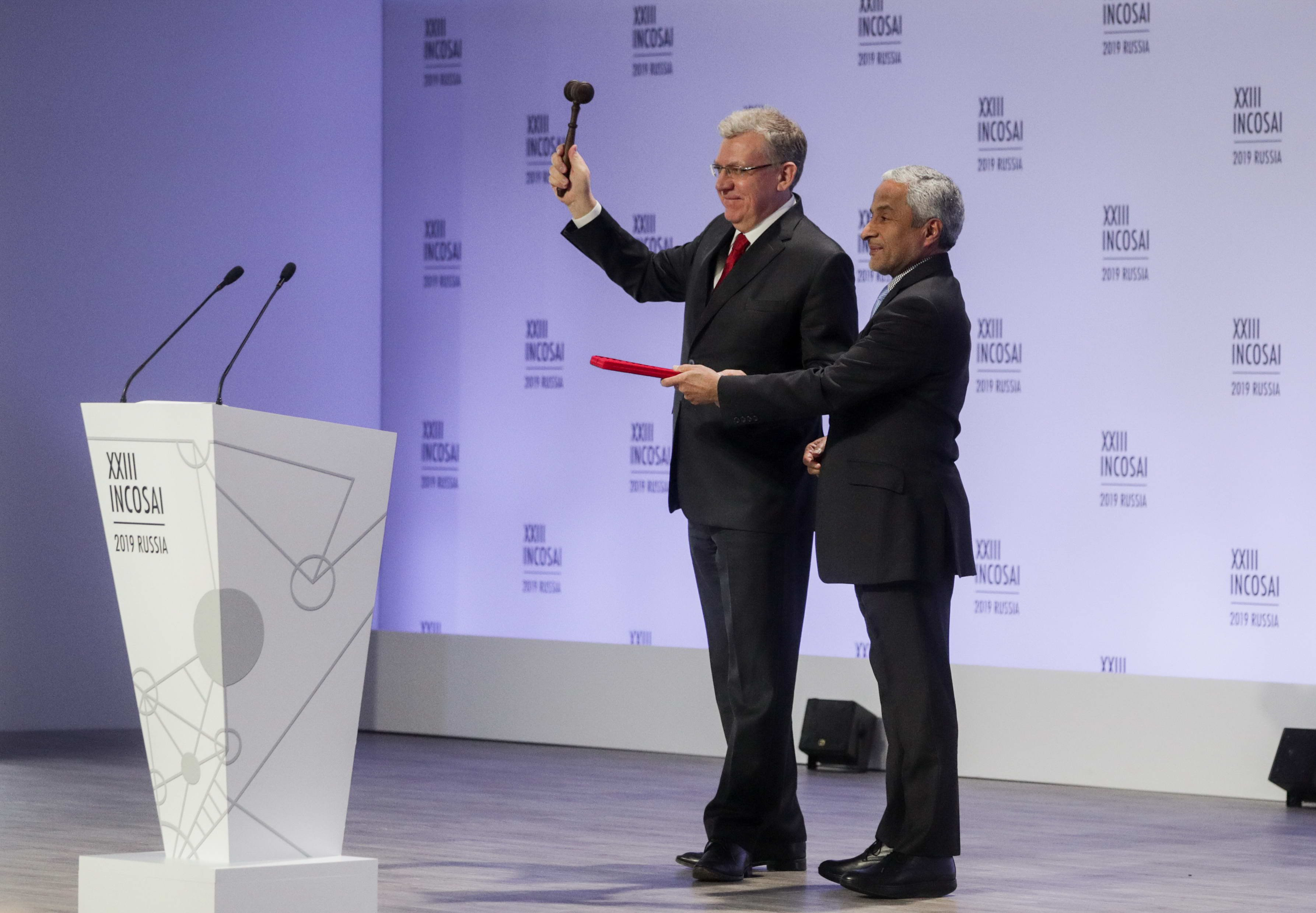 Глава Счетной палаты РФ Алексей Кудрин во время вступления в должность председателя ИНТОСАИ